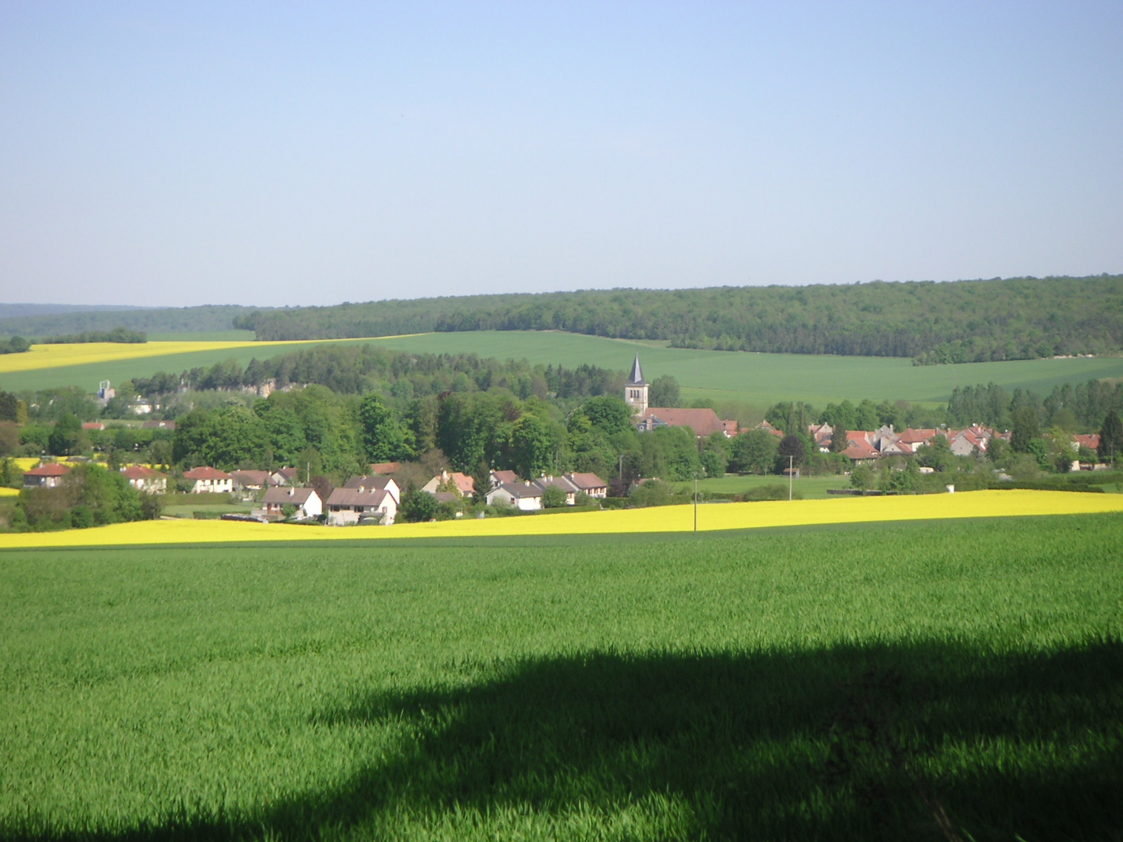 Vanvey-sur-Ource 21400